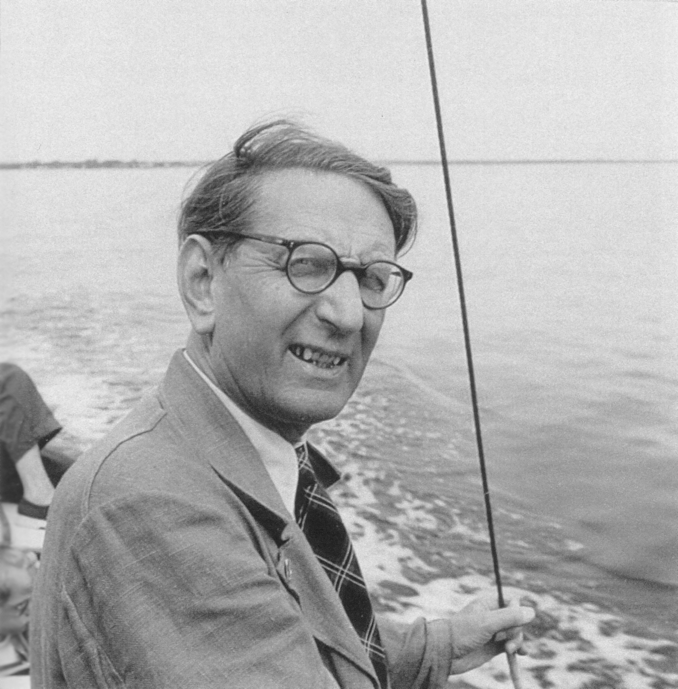 Yngve Larsson, troligen i Trosa skärgård, under en utflykt med sonen Matts motorbåt